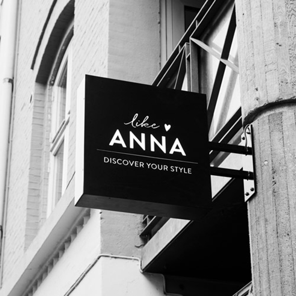 Facadebillede af Like ANNA butik